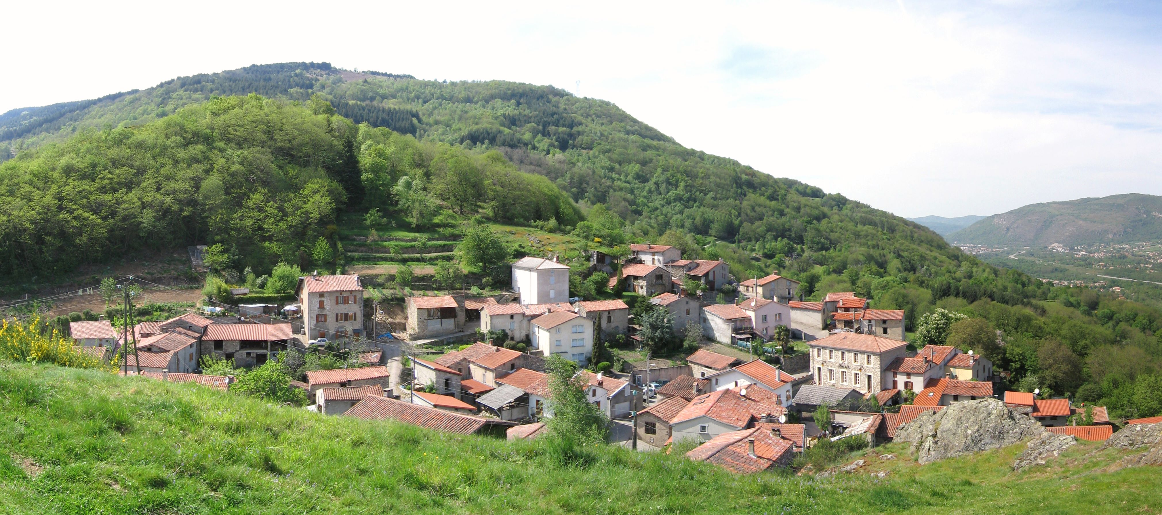 Vue générale de Montoulieu, en Ariège (France).